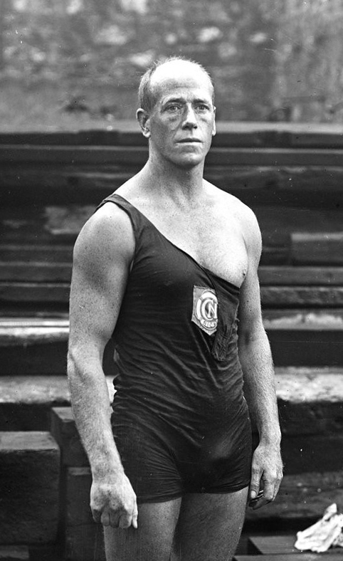 Vasseur, [gagnant le] 1500 m [au championnat de France de natation, 1-8-1920 bassin de la maison Niclausse à la Villette] : [photographie de presse] / [Agence Rol]